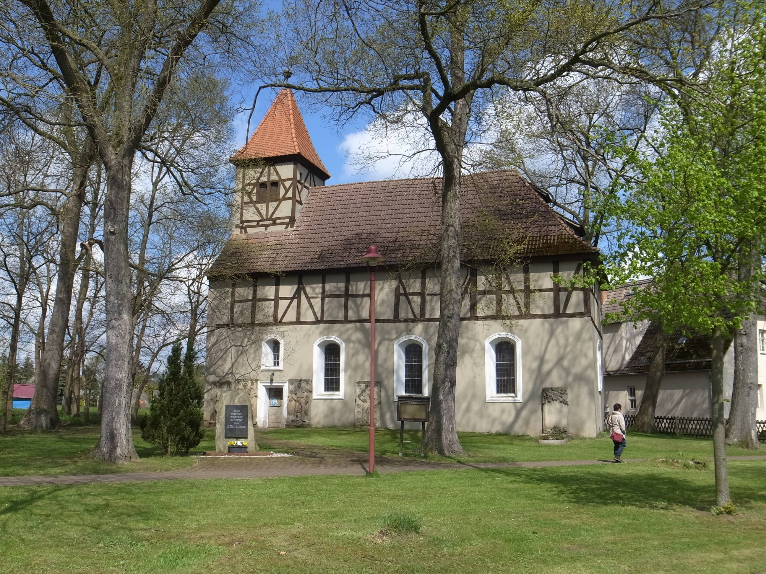 Thießen, Kirche (Baudenkmal im Denkmalverzeichniss Sachsen-Anhalt, Erfassungsnummer: 094 40730 000 000 000 000 [1])